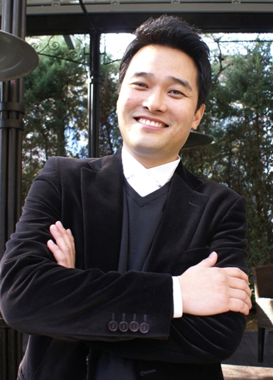 한국의 셰프 에드워드 권과의 인터뷰 사진. 서울 리츠칼튼 호텔에서 촬영.